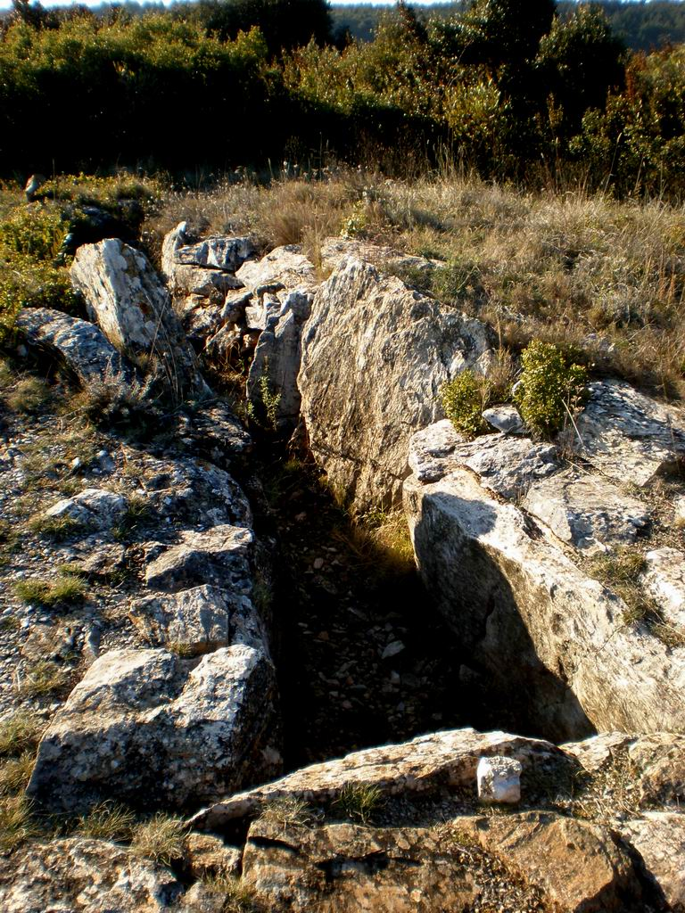 Dolmen de Roque Traoucadou, (Villeneuve-Minervois, Aude)